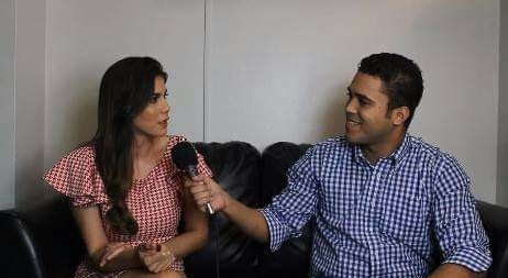 Jomi Santelises sostiene una entrevista para uno de sus proyectos